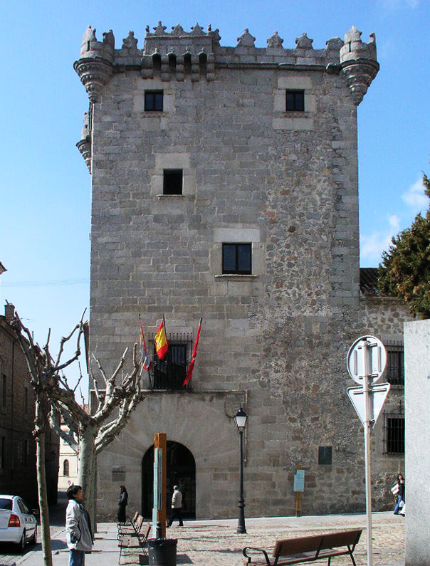 Torreon de los Gusmanes, Ávila de los Caballeros, Spain.